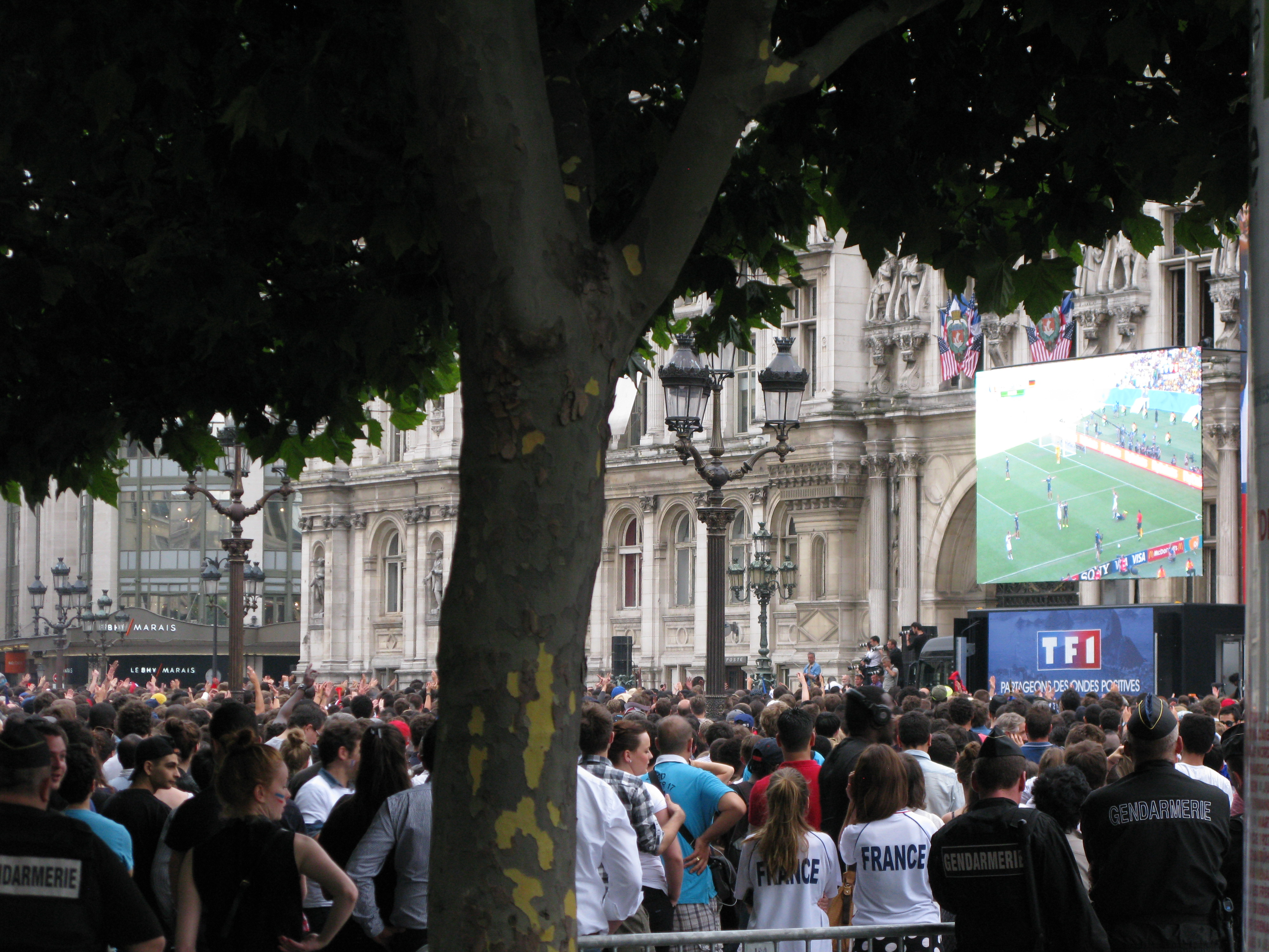 France - Allemagne lors de la Coupe de monde 2014, parvis de l'Hôtel de Ville de Paris.